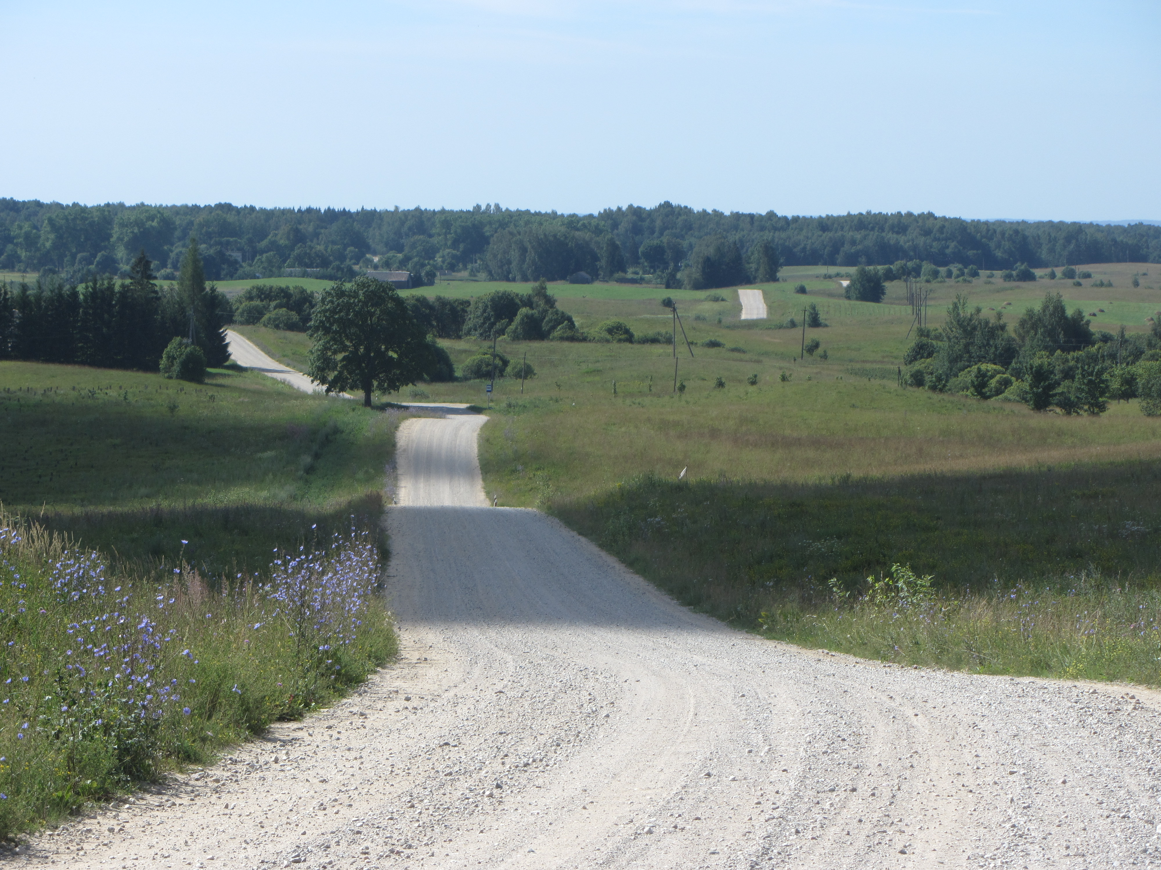 Giedraičių sen., Lithuania